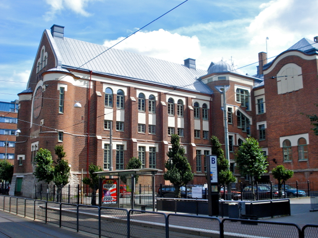 Samskolan på Stampen i Göteborg tillsammans med Svingelns spårvagnshållplats